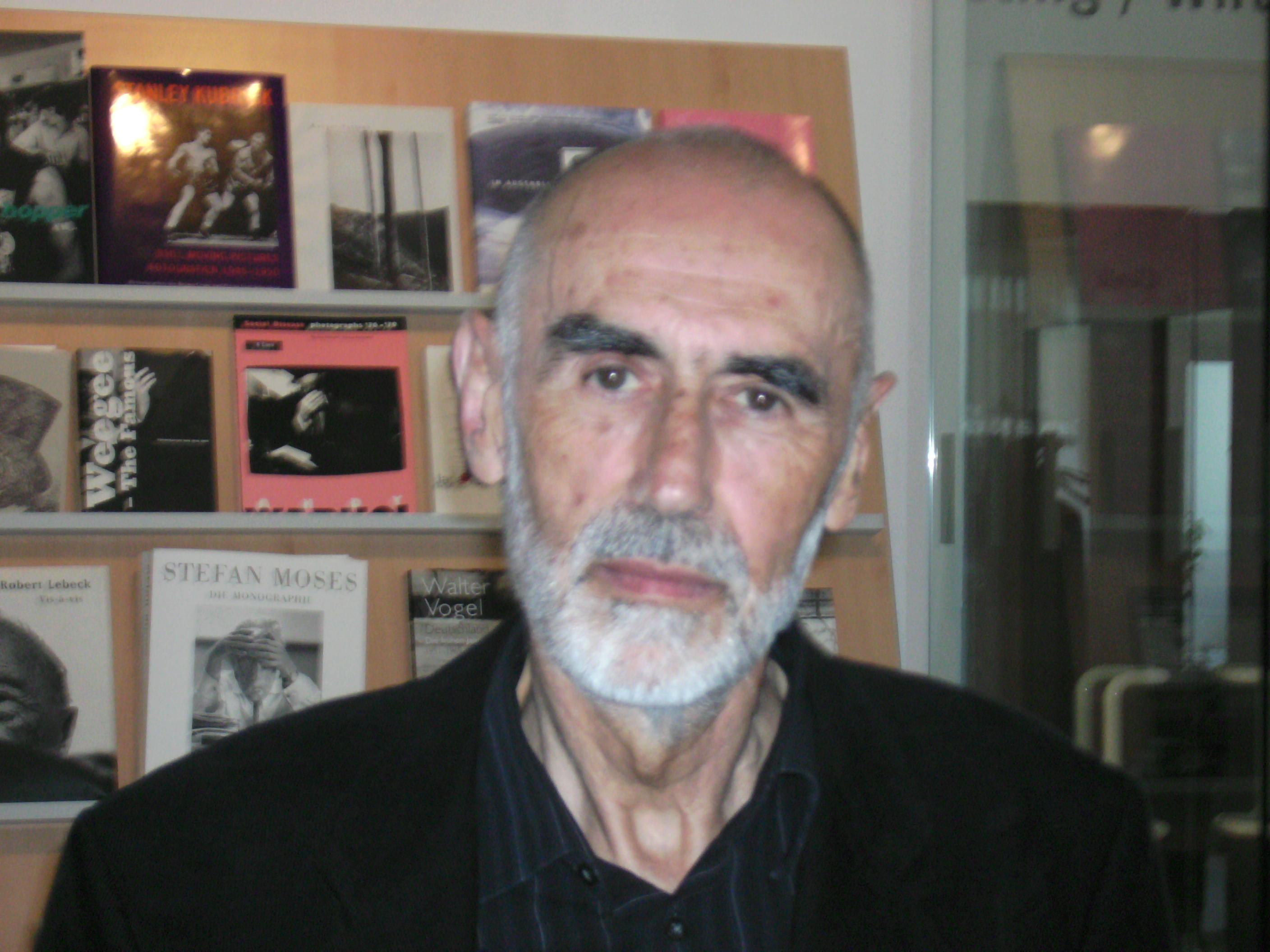 Portrait des Lichtkünstlers Werner Bauer